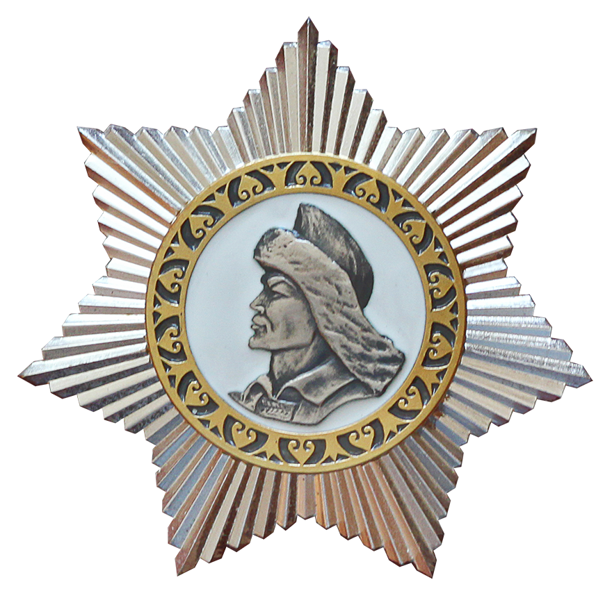 Орден Салавата Юлаева